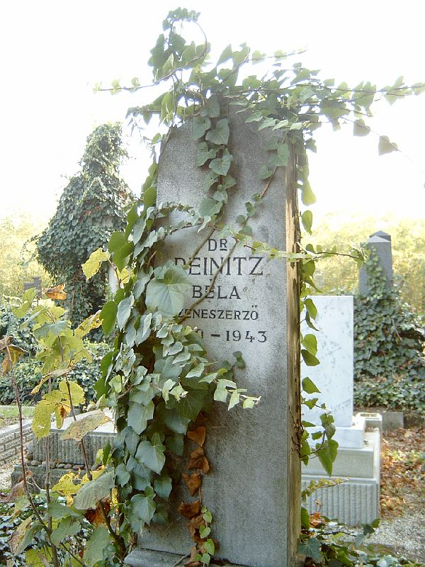 Reinitz Béla (Budapest, 1878. november 15. – Budapest, 1943. október 26.) magyar zeneszerző, zenekritikus sírja Budapesten. Kozma utcai izraelita temető: 5B-8-5.